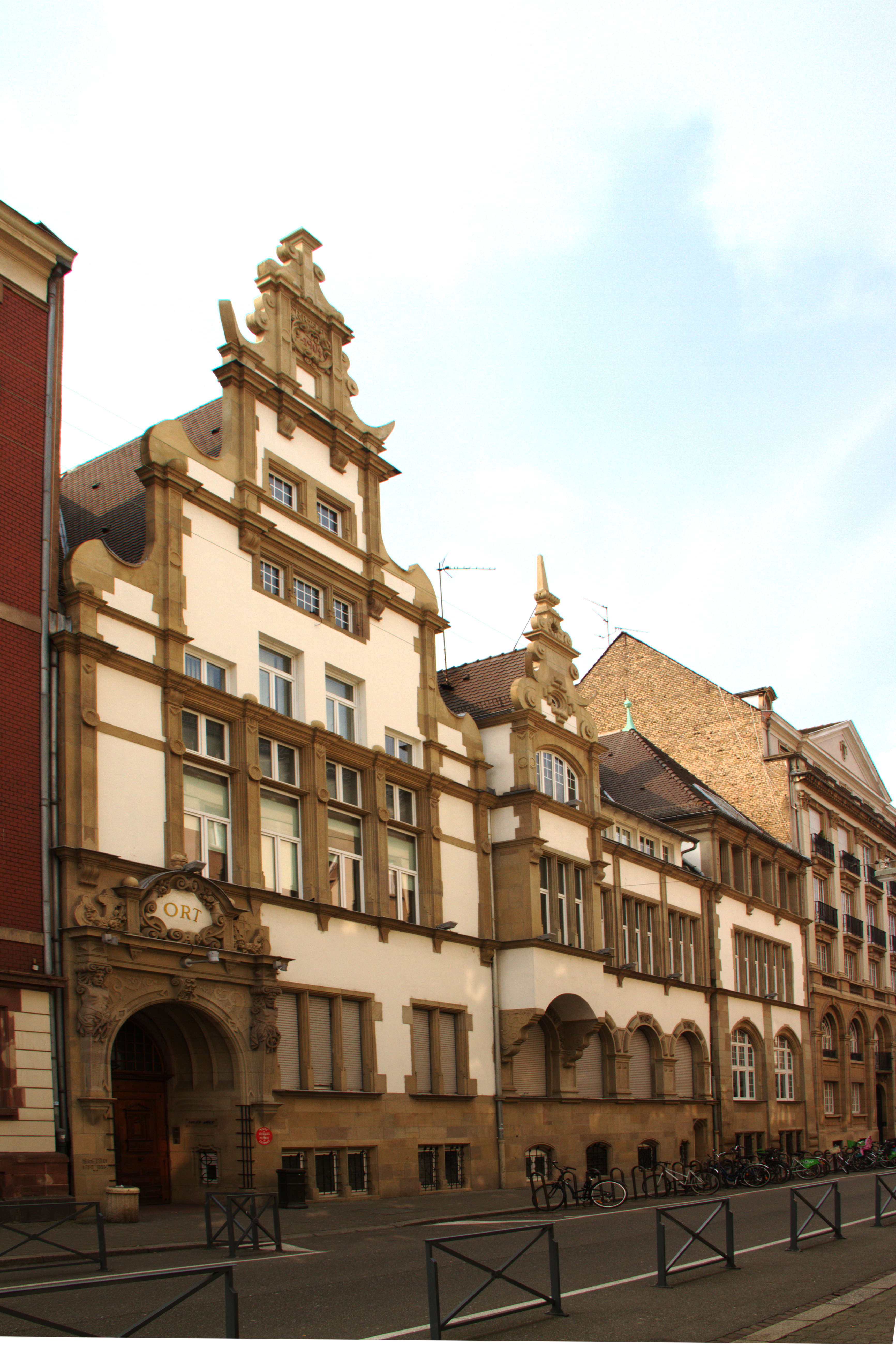 Strasbourg, 14 rue Sellénick, siège de l’école ORT de Strasbourg